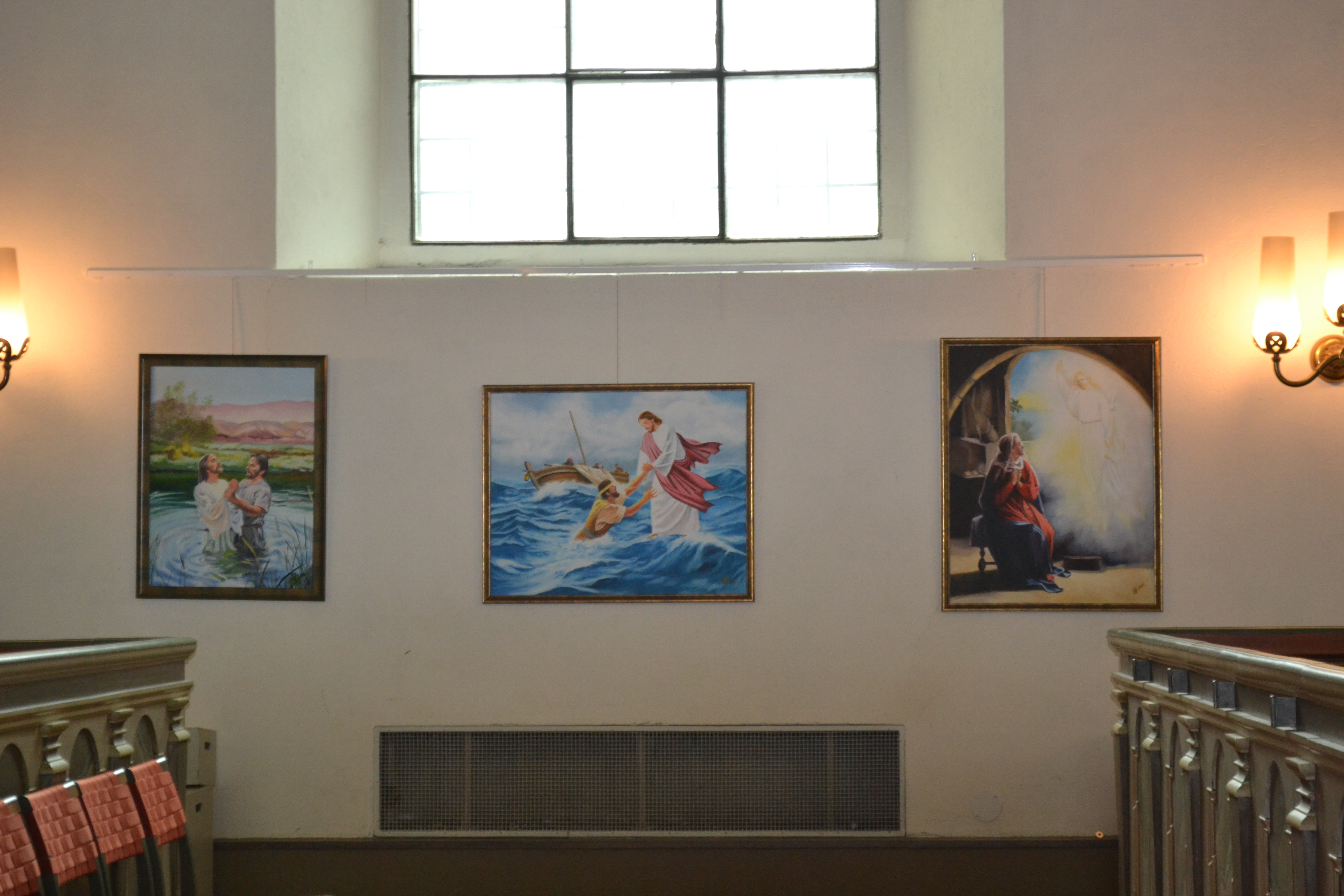 Sankt Olai kyrka in Norrköping